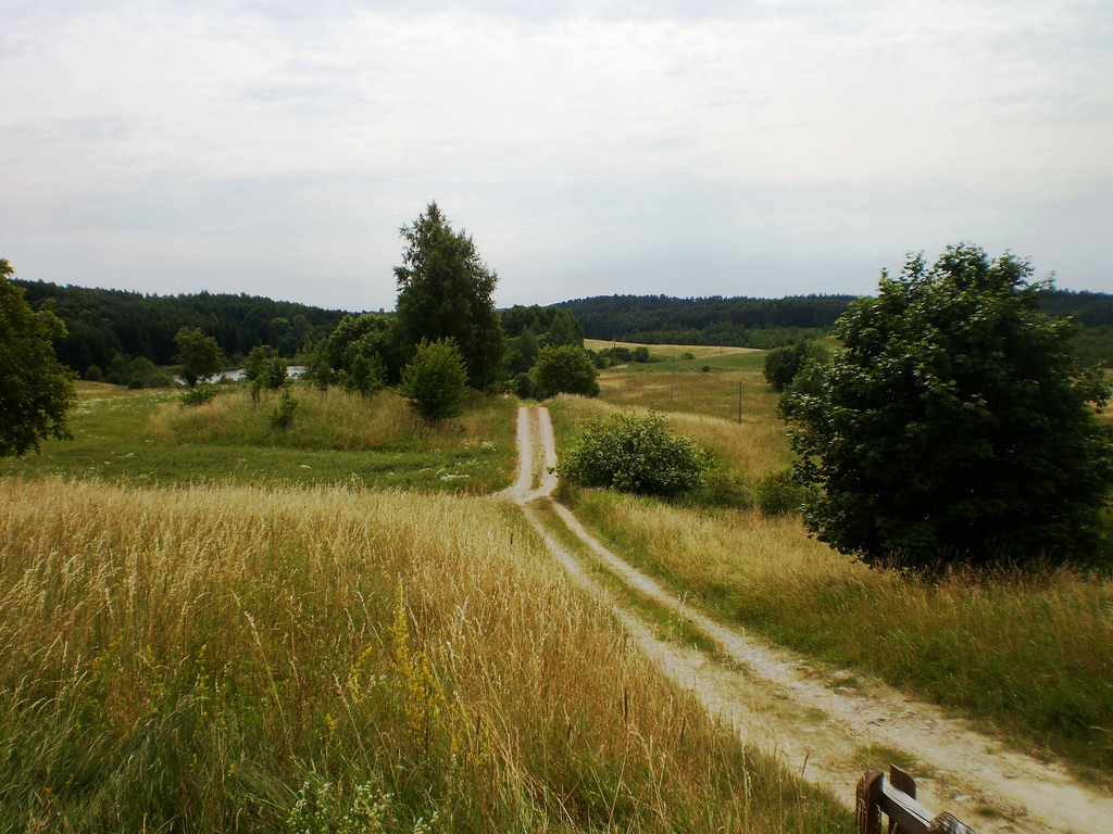 Vietinis kelias netoli Pavištyčio k., Vilkaviškio raj.